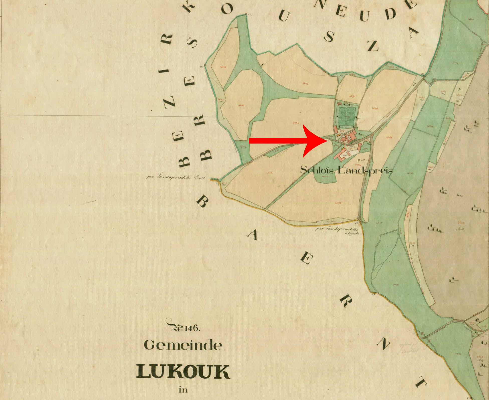 Franciscejski kataster za Kranjsko, 1823-1869